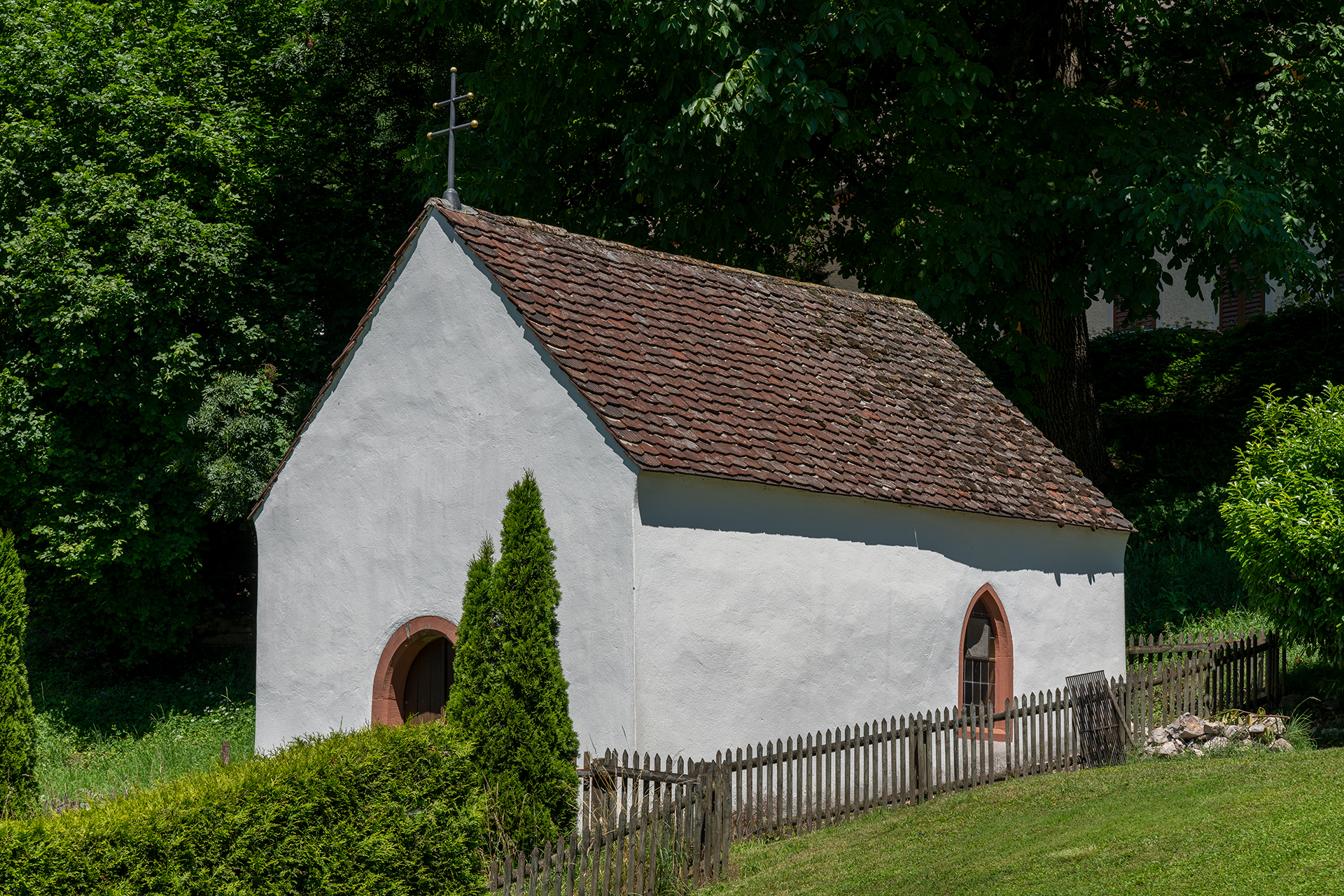 Sankt-Wendelinskapelle in Hellikon (AG)